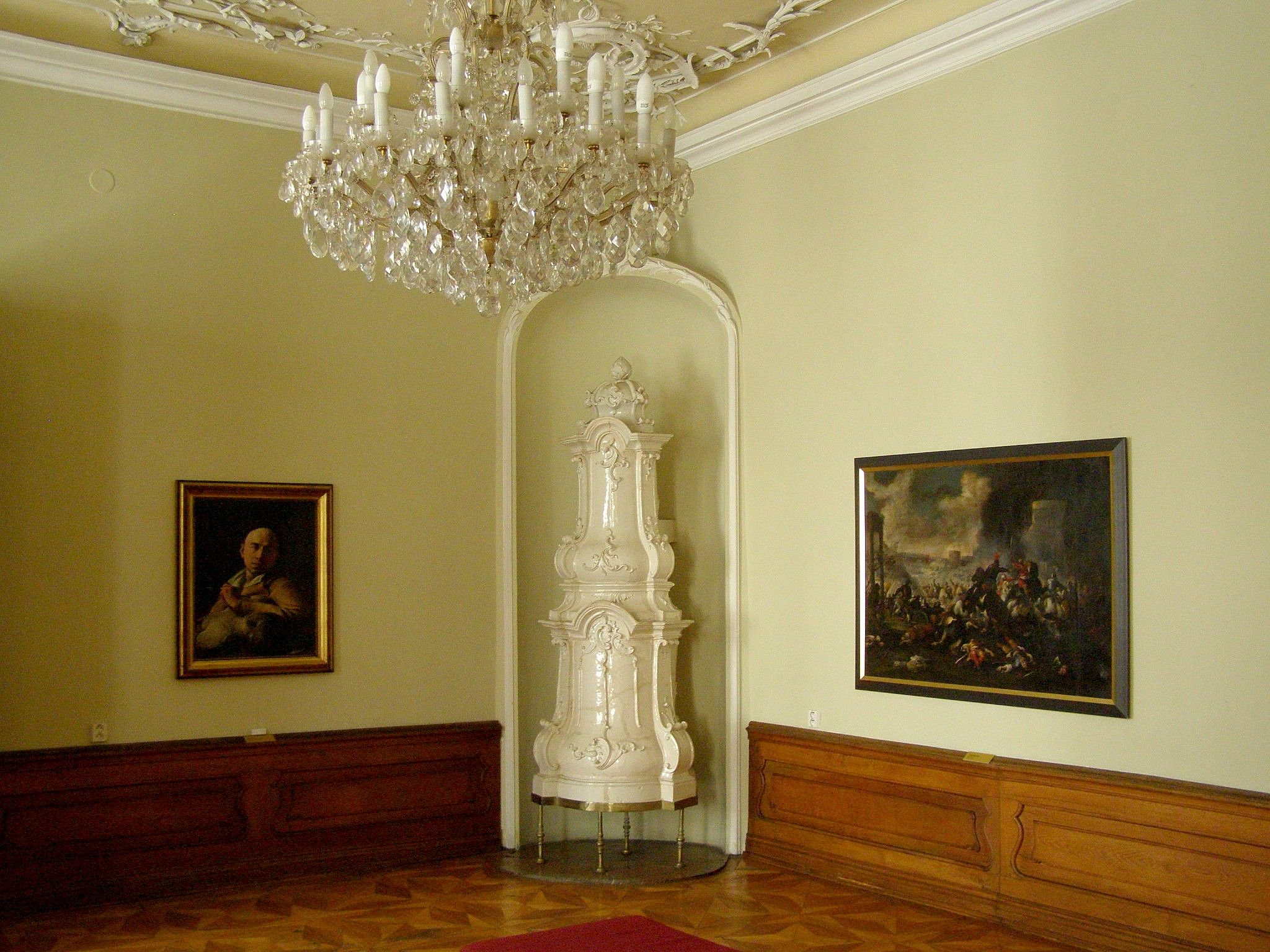 Pohľad do expozície Stredoeurópske barokové maliarstvo a sochárstvo